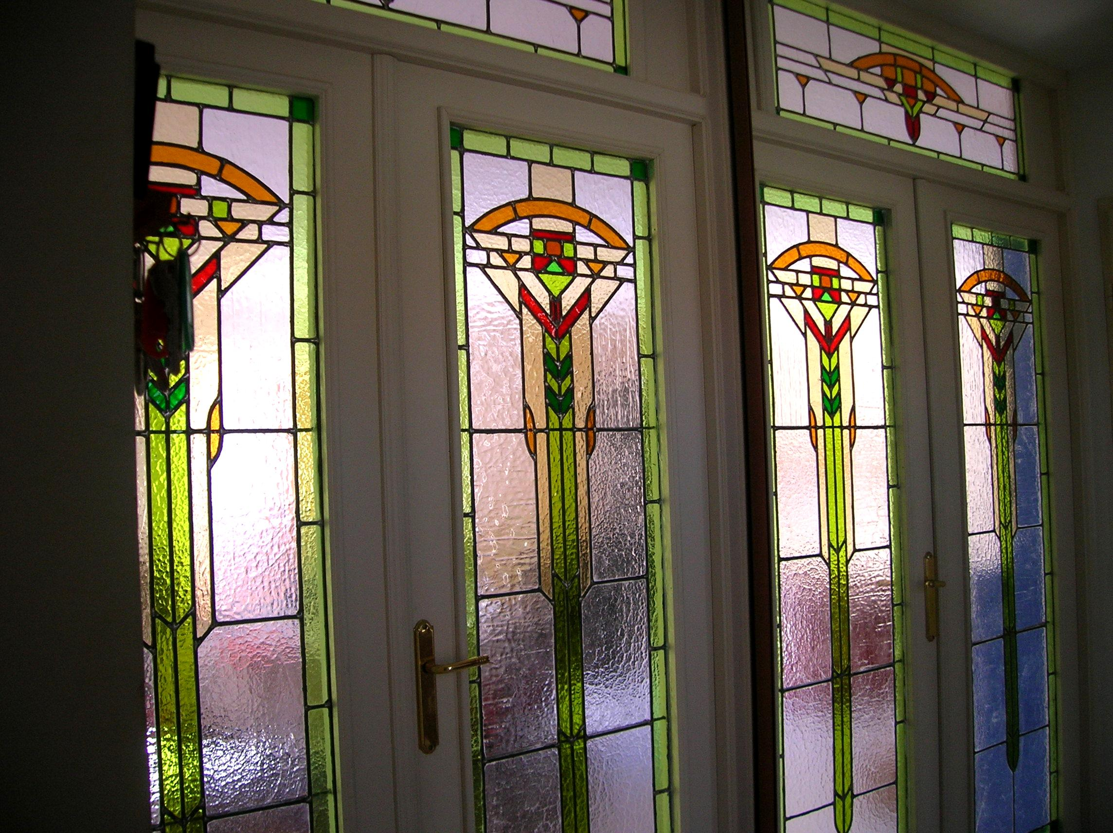 Carlo Roccella